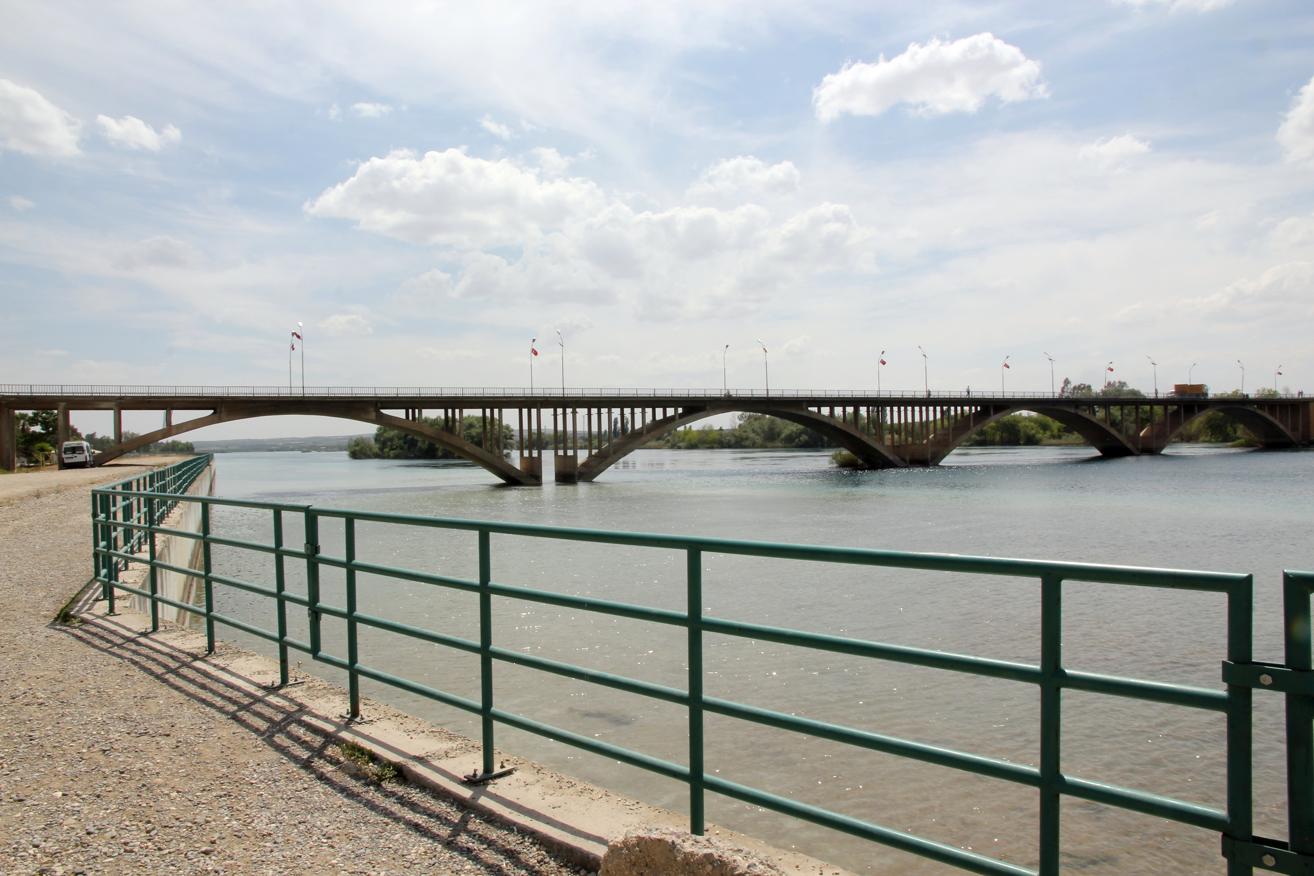 Euphratbrücke in Birecik, Türkei